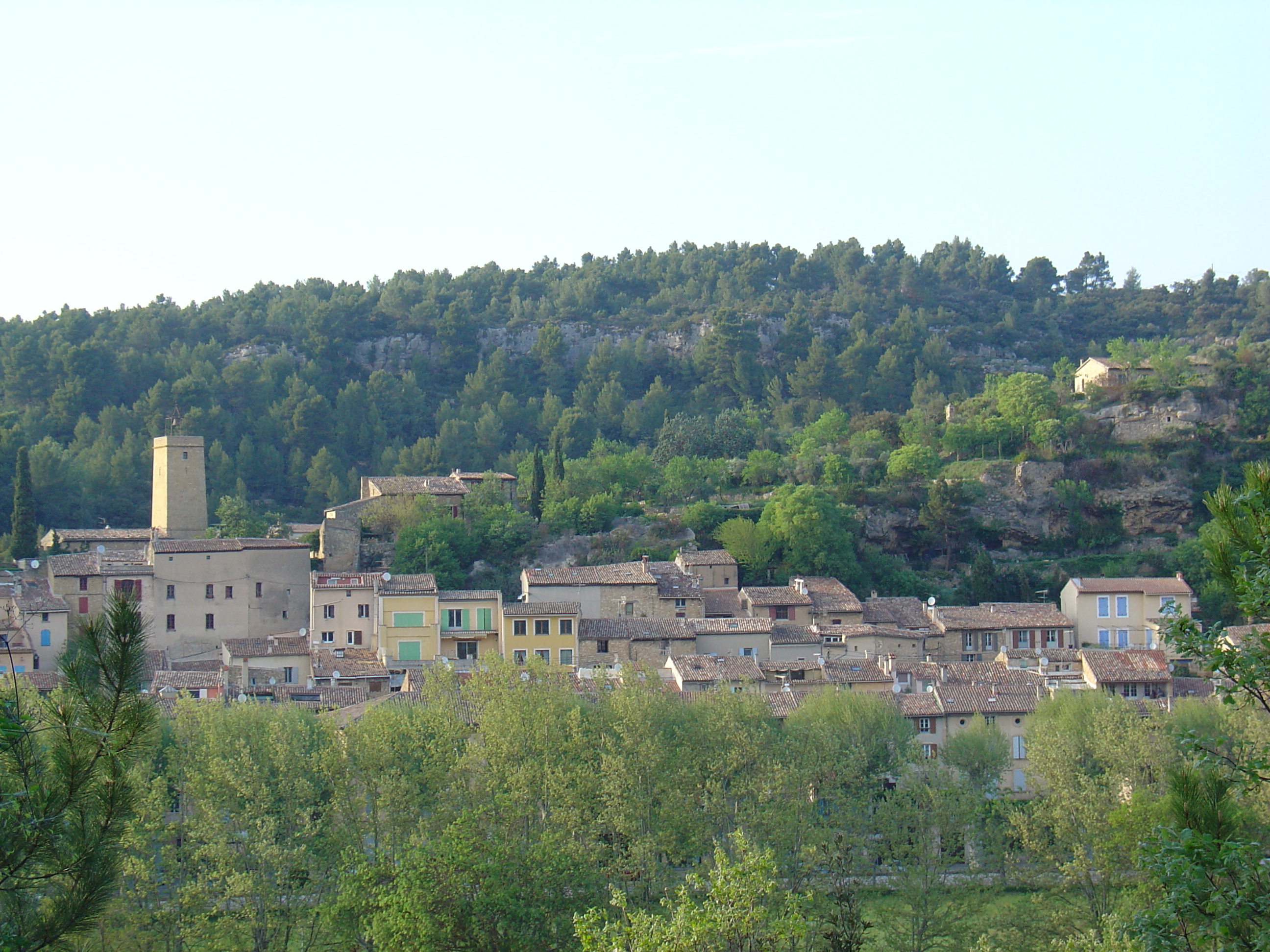 Jouques, Bouches-du-Rhône (France)